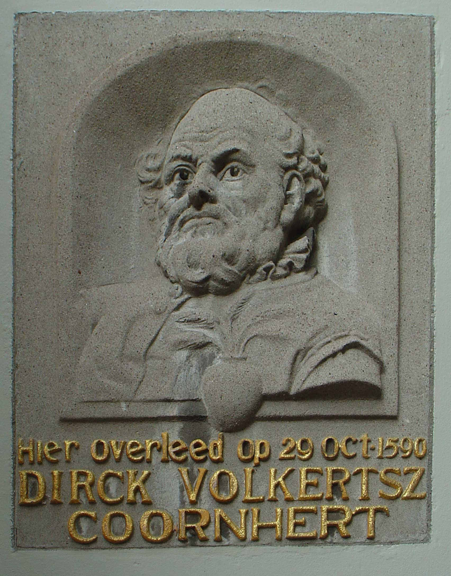 Dirck Volkertsz. Coornhert door Theo van Reijn Oosthaven Gouda